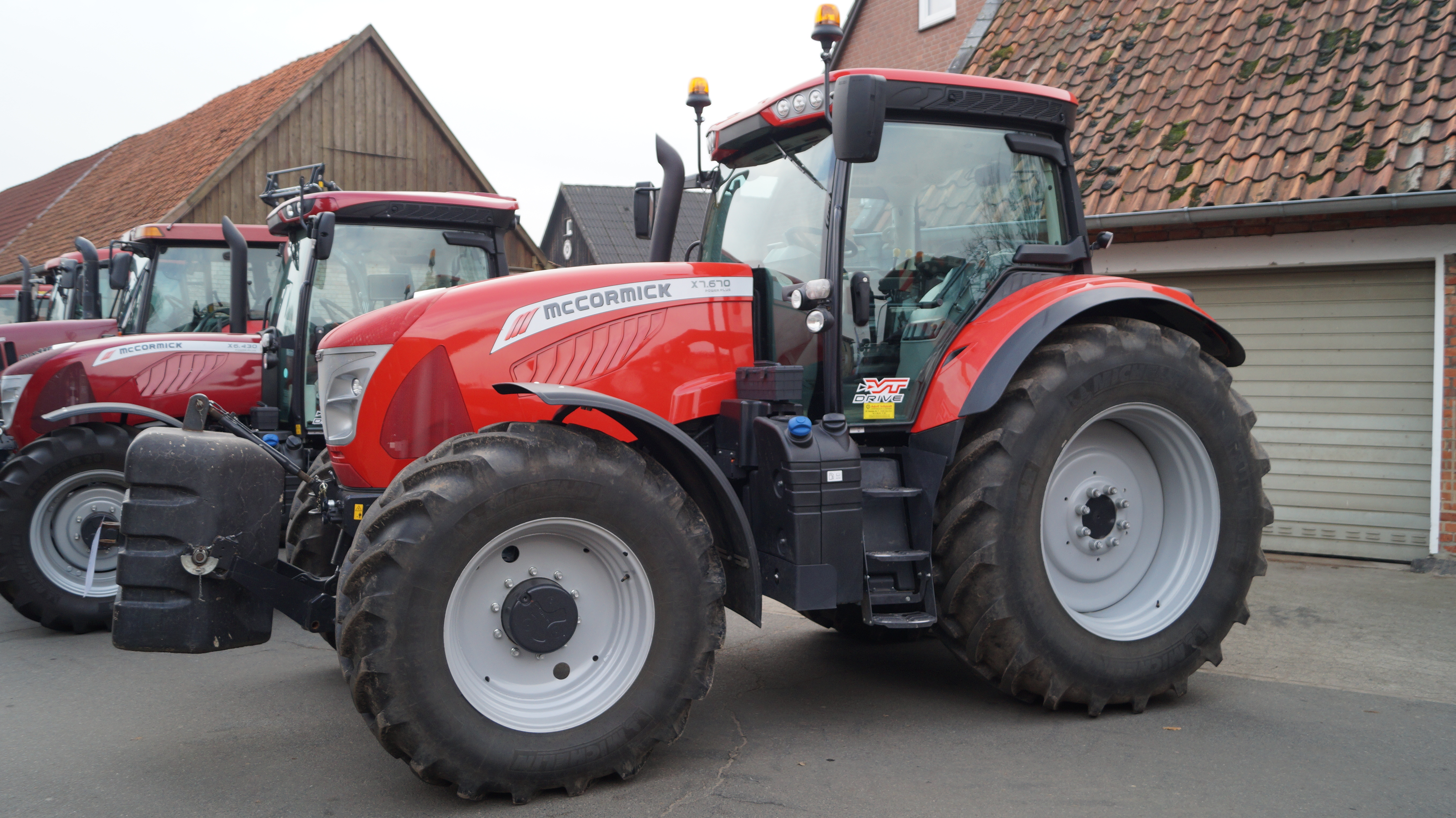 Schrägansicht der Front eines McCormick X7.670 VT-Drive Power Plus, ausgestellt bei der Schmidt Landmaschinen GmbH & Co. KG im Obernholzer Ortsteil Steimke.